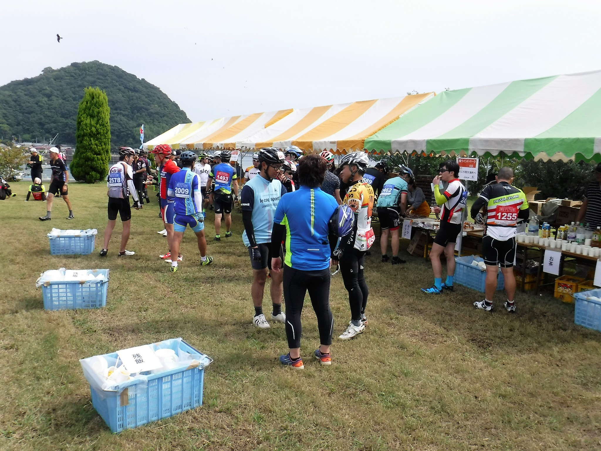 2017年、山口県柳井市で開催された、サザンセトロングライド。エイドステーション。橘ウインドパーク